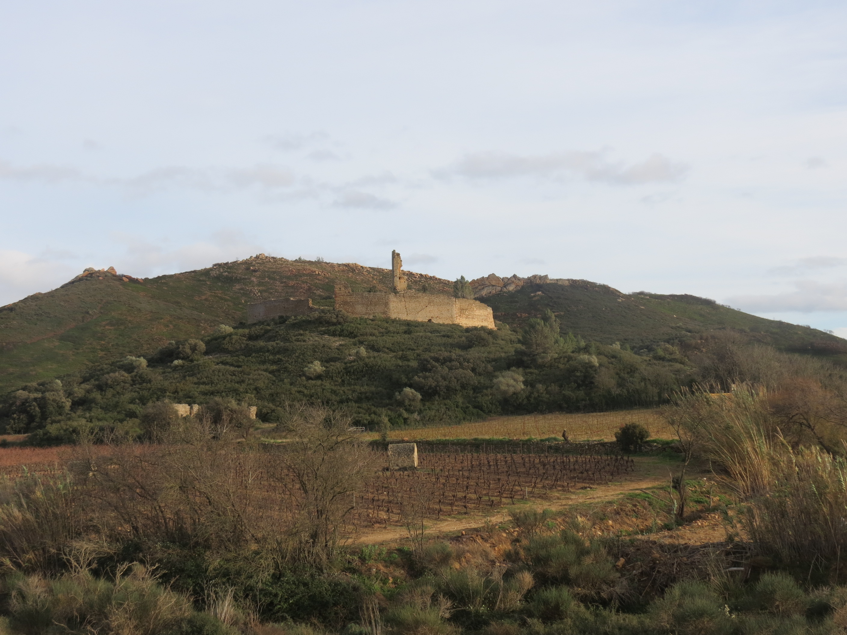 Château de Saint-Pierre-des-Clars, Montredon-des-Corbières, Aude, Languedoc-Roussillon, France.